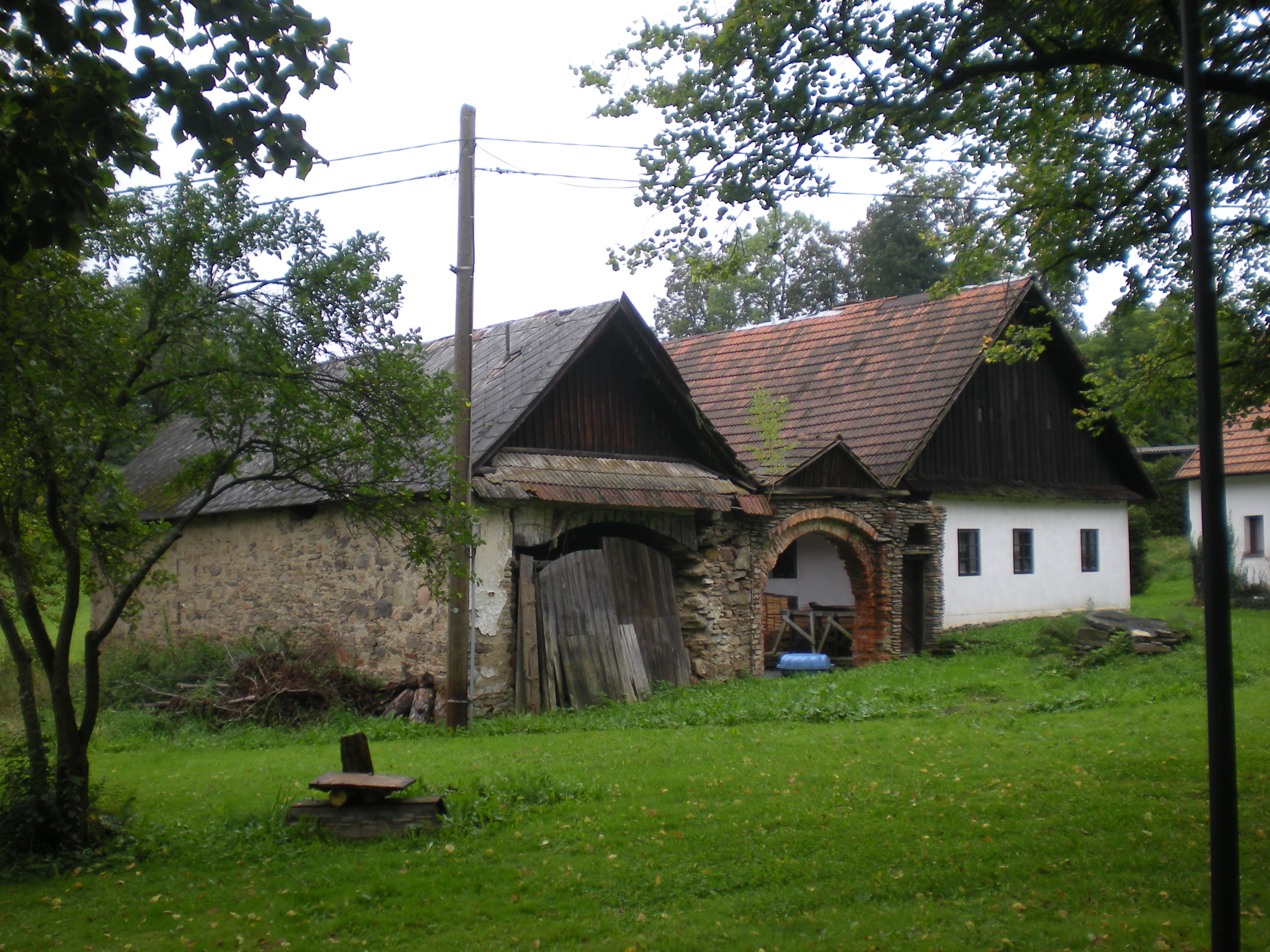 Usedlost čp. 26, Ubušínek 26, jižní část obce, Ubušínek.